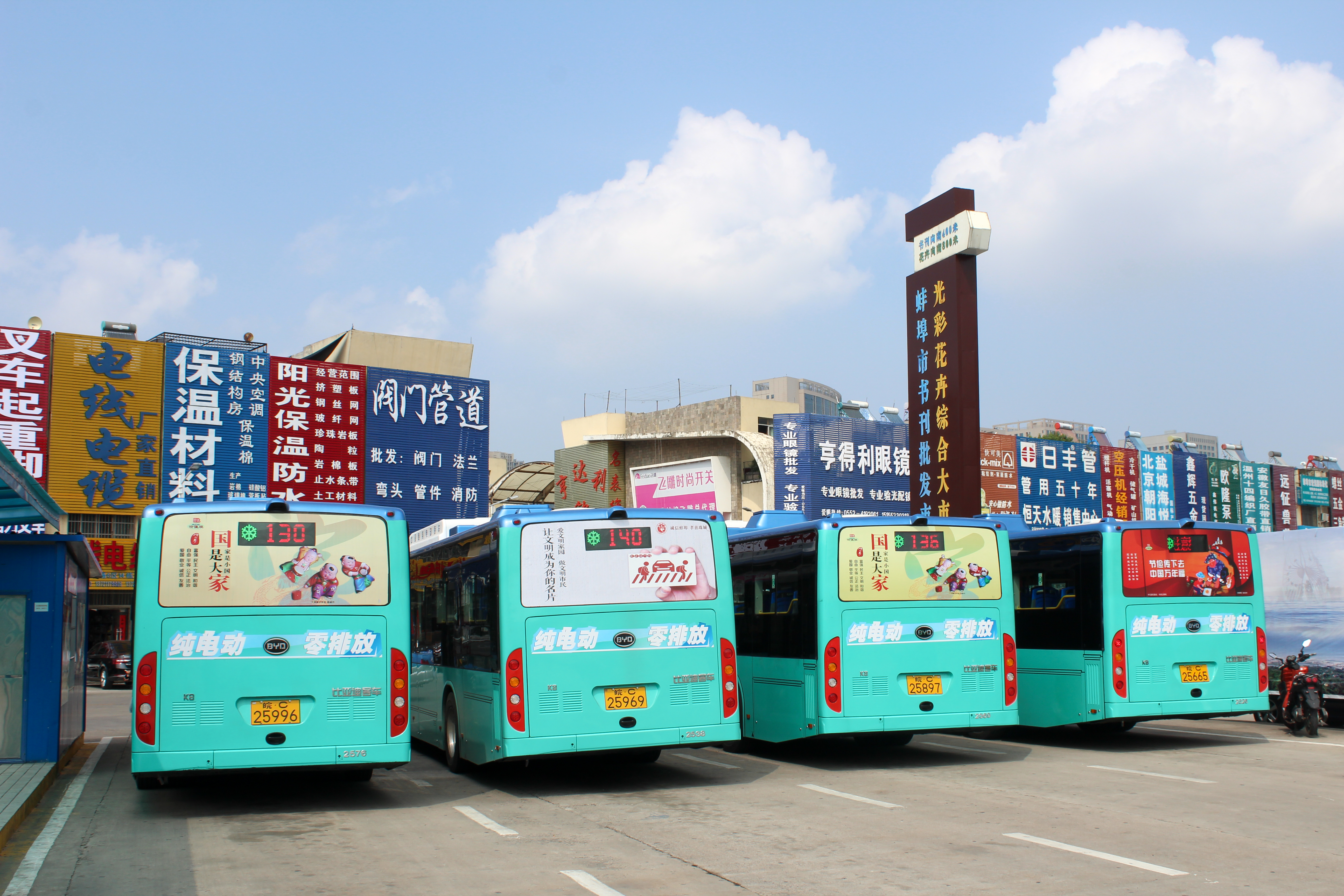 中文（中国大陆）: Bengbu Bus No.130&140&136&133